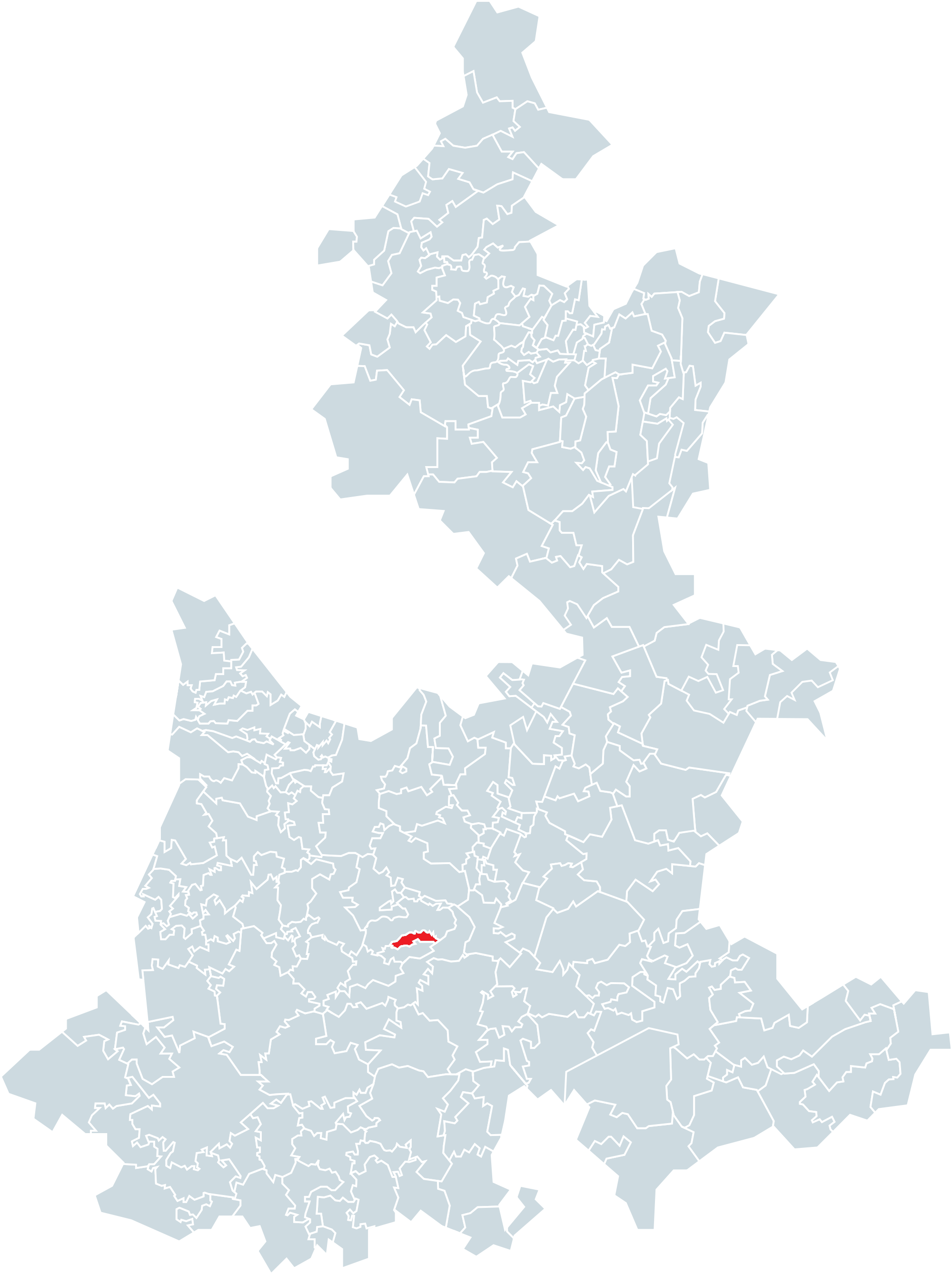 Municipio de Chigmecatitlán